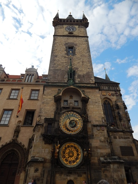 Քրոջս ամառային ճամփորդությունից